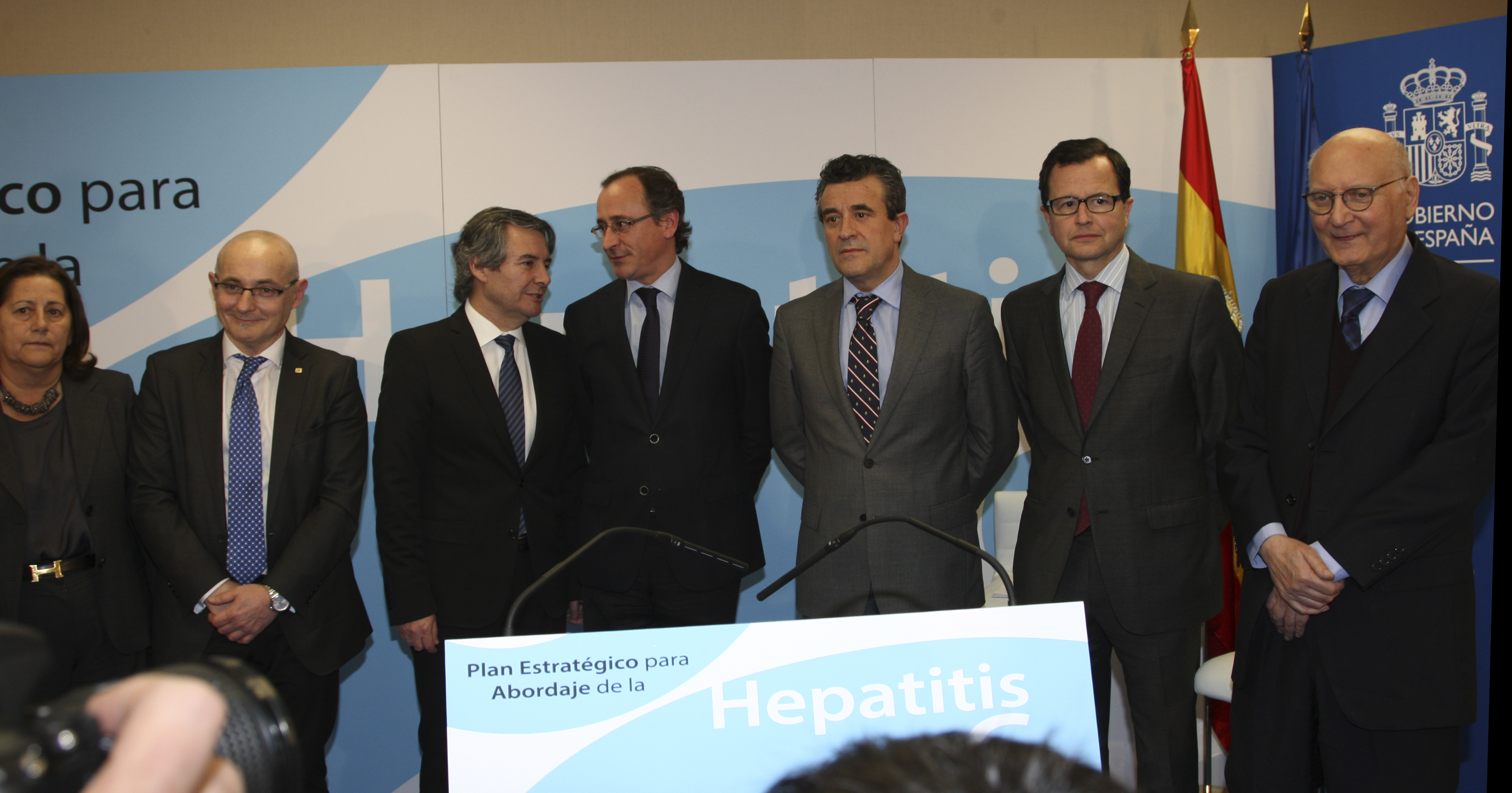 Expertos responsables de la elaboración del Plan Estratégico para el Abordaje de la Hepatitis C en España